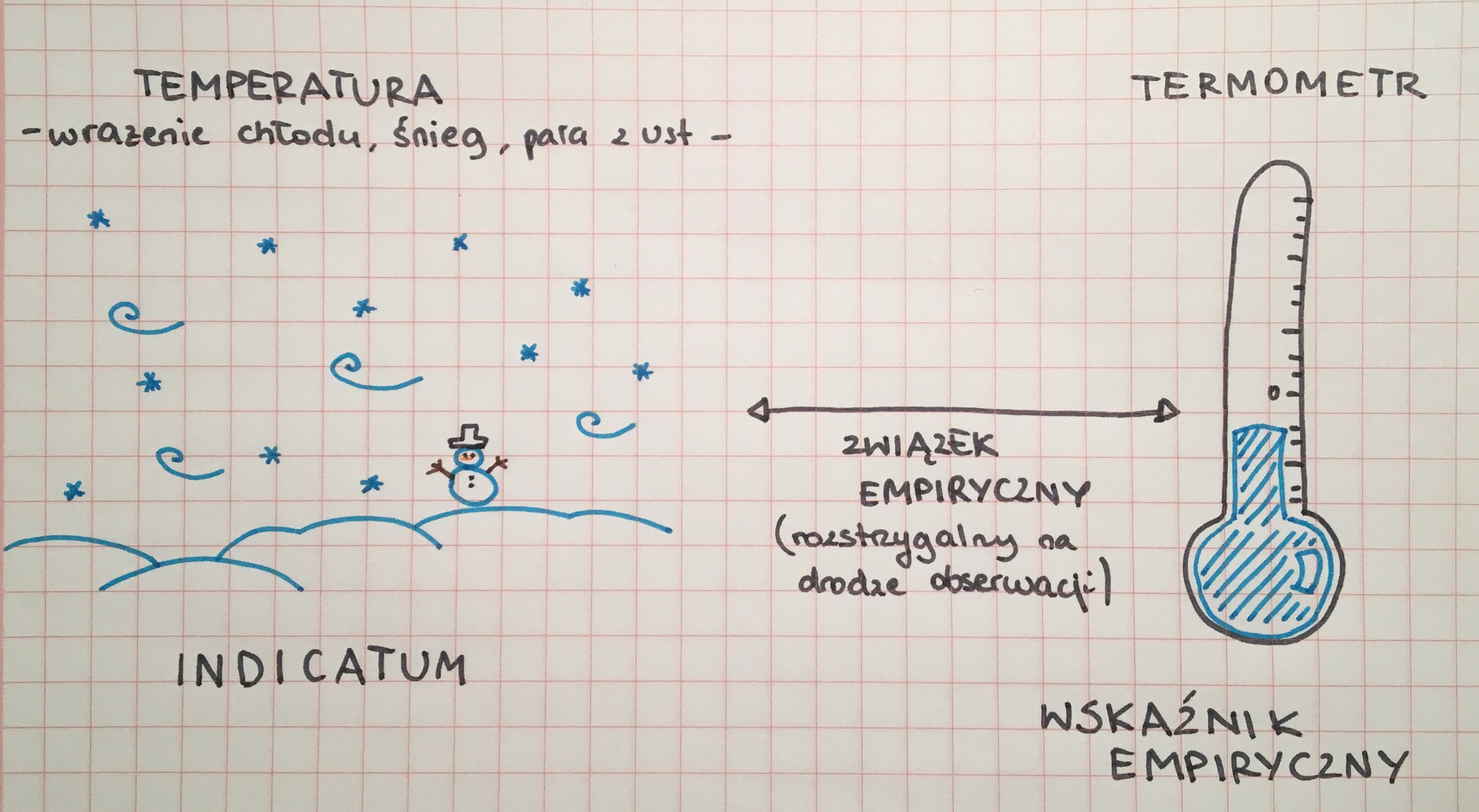 Długość słupka rtęci w termometrze jako wskaźnik empiryczny temperatury - rysunek schematyczny ułatwiający zrozumienie podanego przykładu